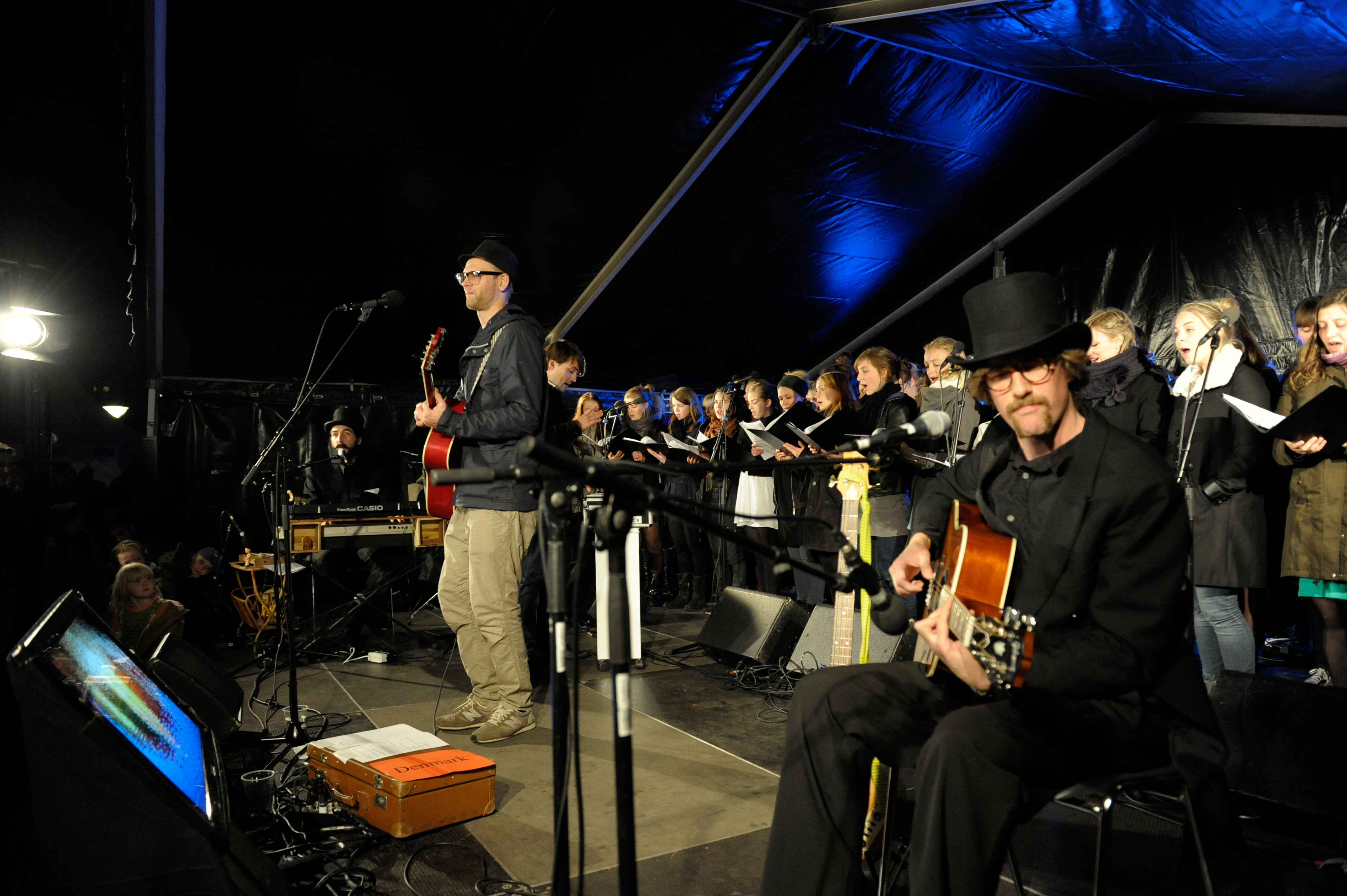 N*grandjean spelar på kulturnatten 2010.